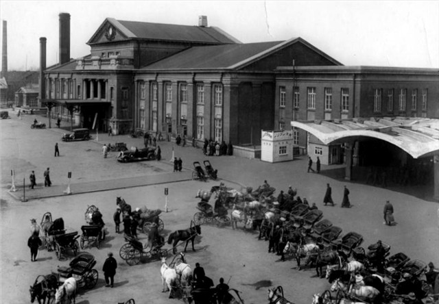 满洲国新京站，即中国吉林省长春市长春火车站旧照